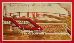 Das Kloster Mariaberg in Rorschach